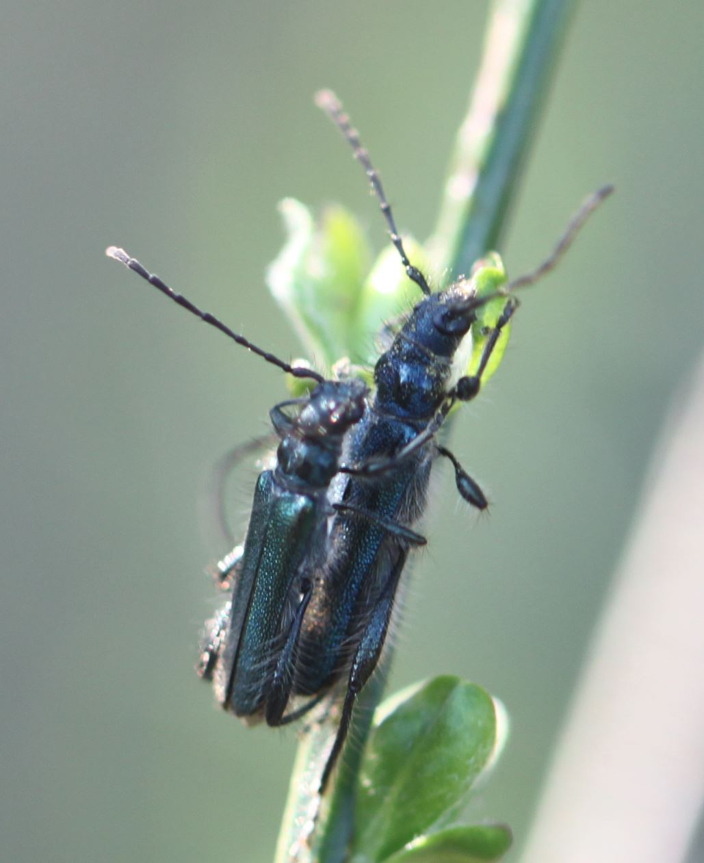 Schmaldeckenbock (Callimus angulatus), Paarung, am 18. April 2019 in der Schwetzinger Hardt